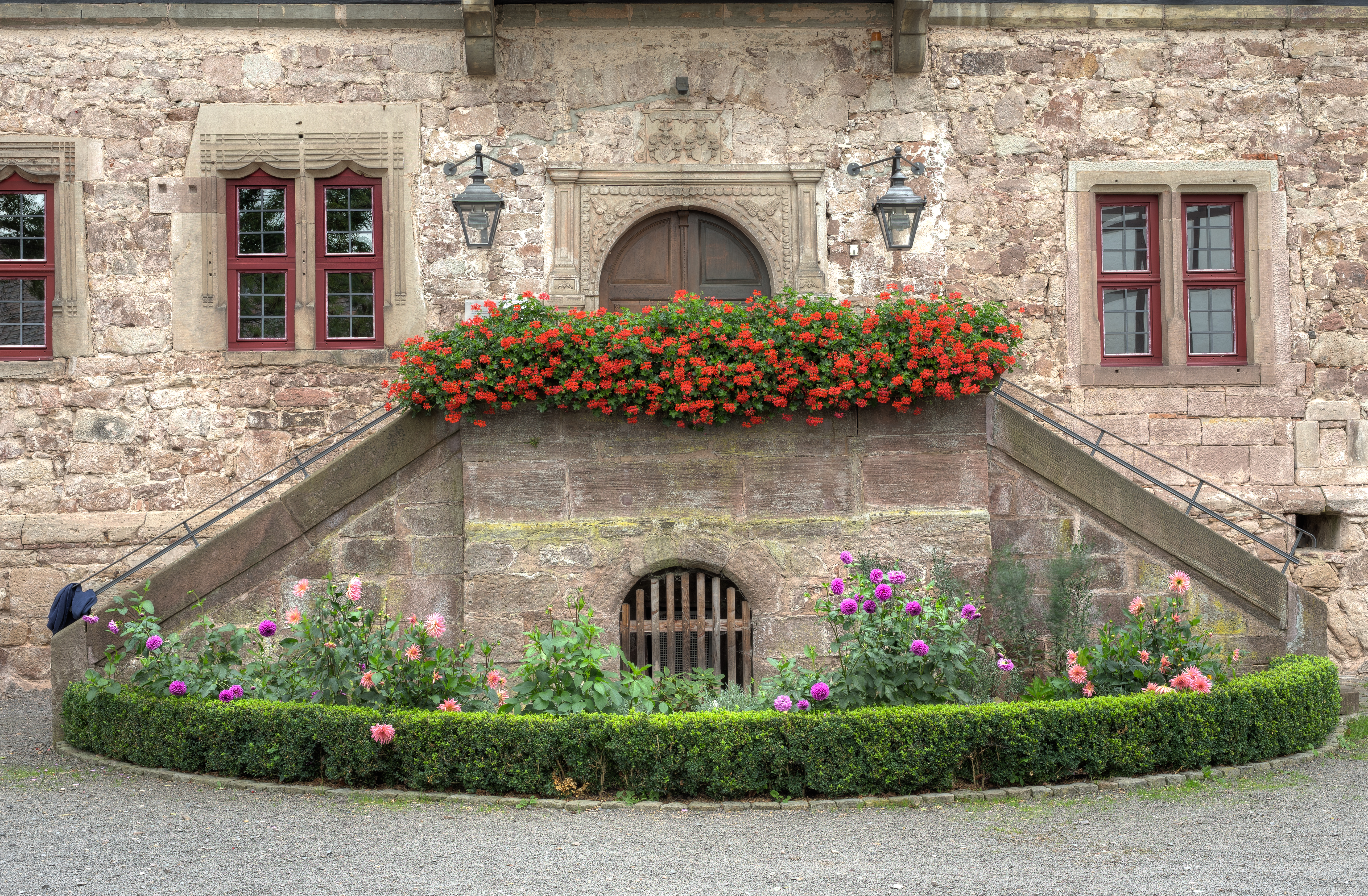 Treppenaufgang Schloss Ermschwerd.